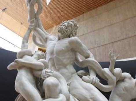 Laooconte con sus hijos en la Sala de escultura didáctica El Canon Griego